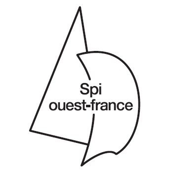 Logo de l'épreuve